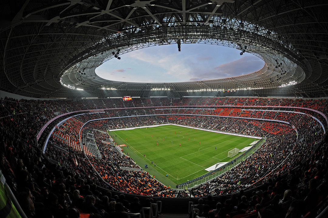 Ракурс 3